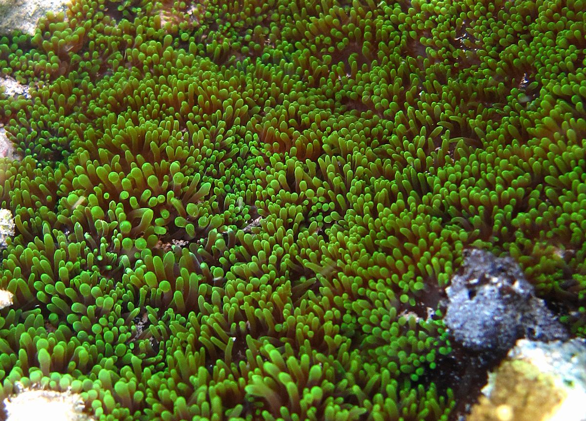 Une anémone Gyractis sesere' à la Réunion.